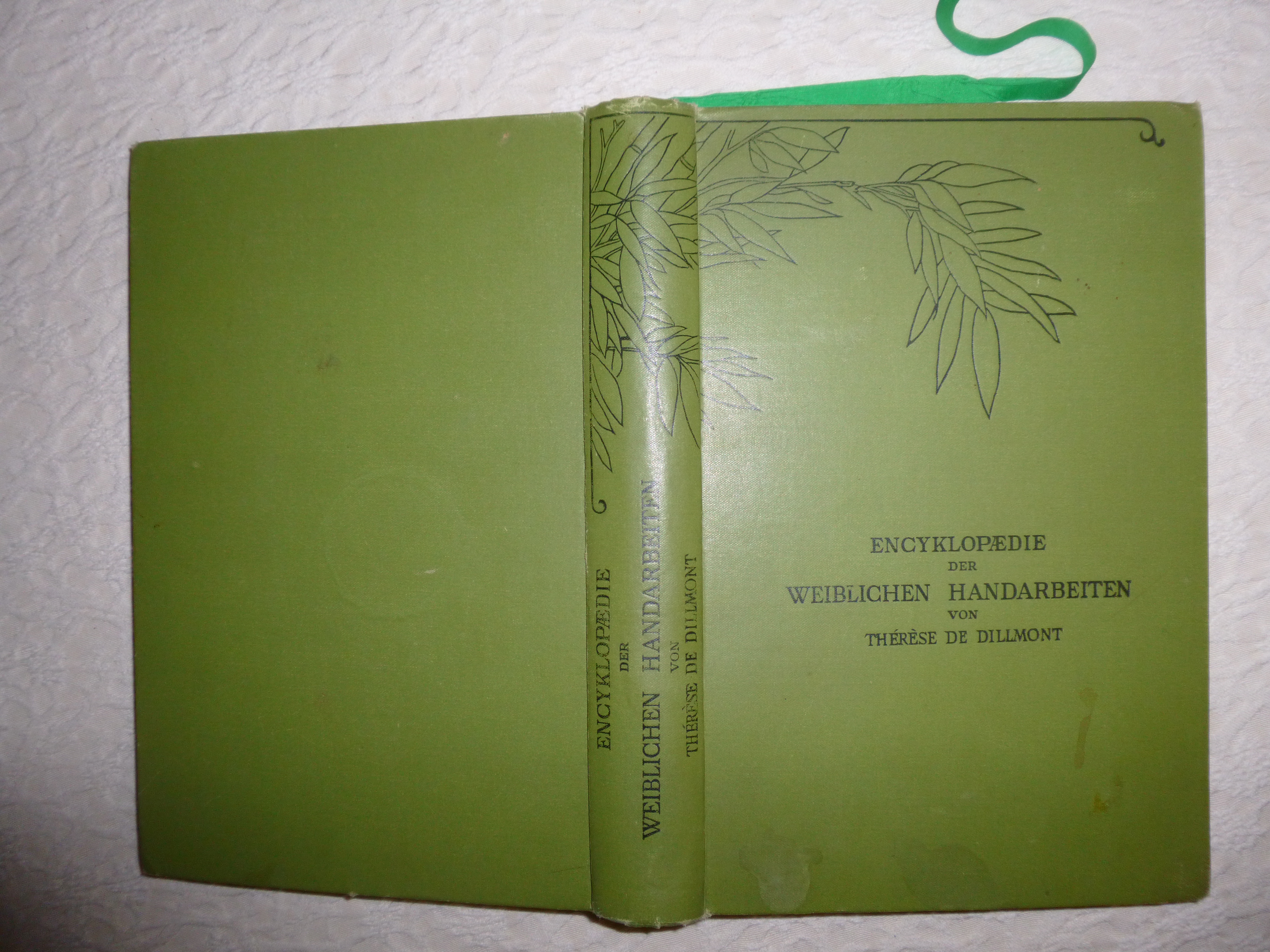 Encyklopädie der weiblichen Handarbeiten 1893